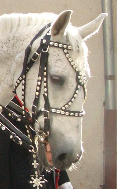 Close-up from Image:Weingarten Blutritt Blutreiter 2007.jpg Description: Blutritt Weingarten, Der Heilig-Blut-Reiter (P. Pirmin Meyer OSB) Original photographer: Markus Nägele